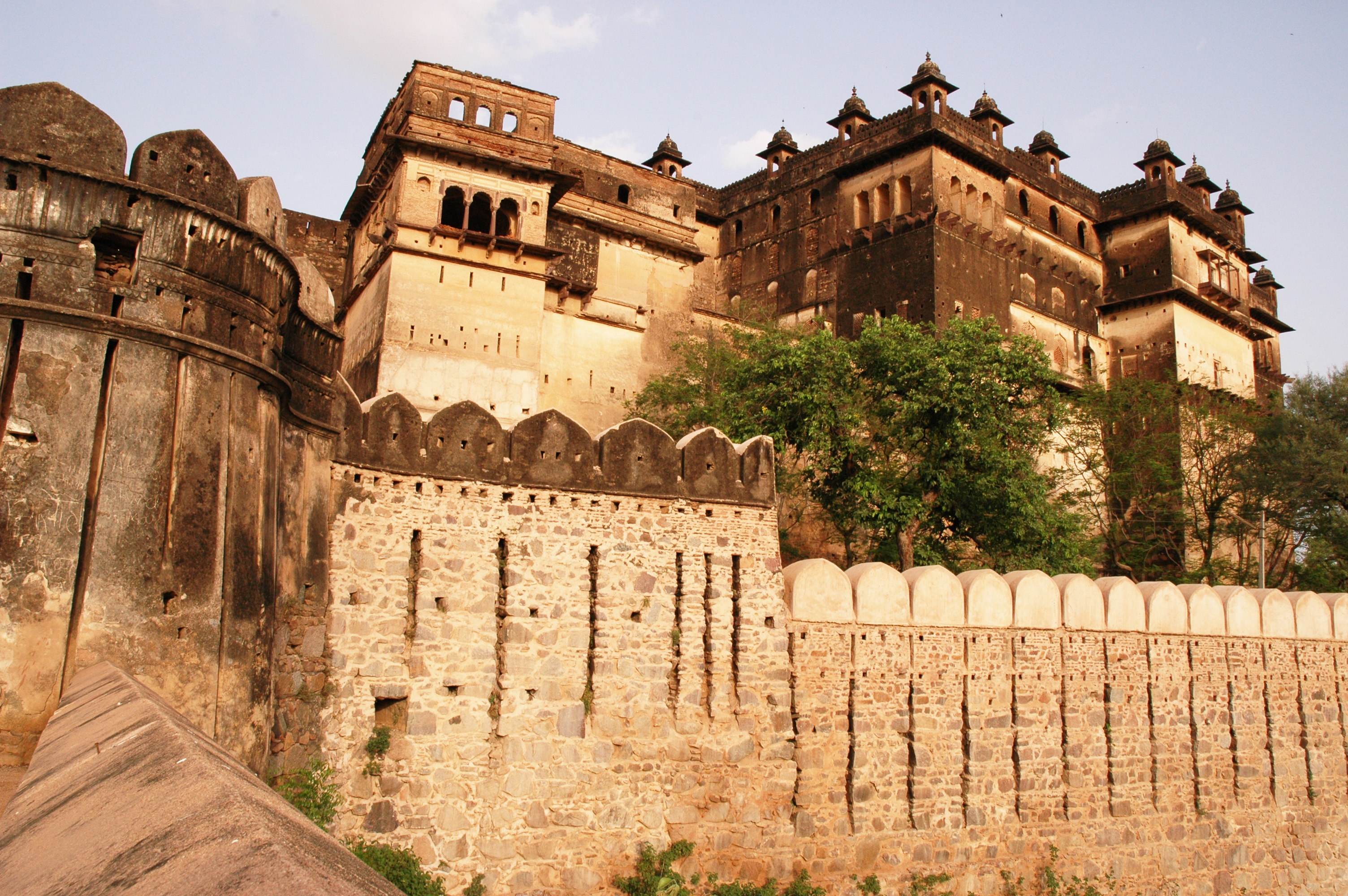 Madhya Pradesh, India